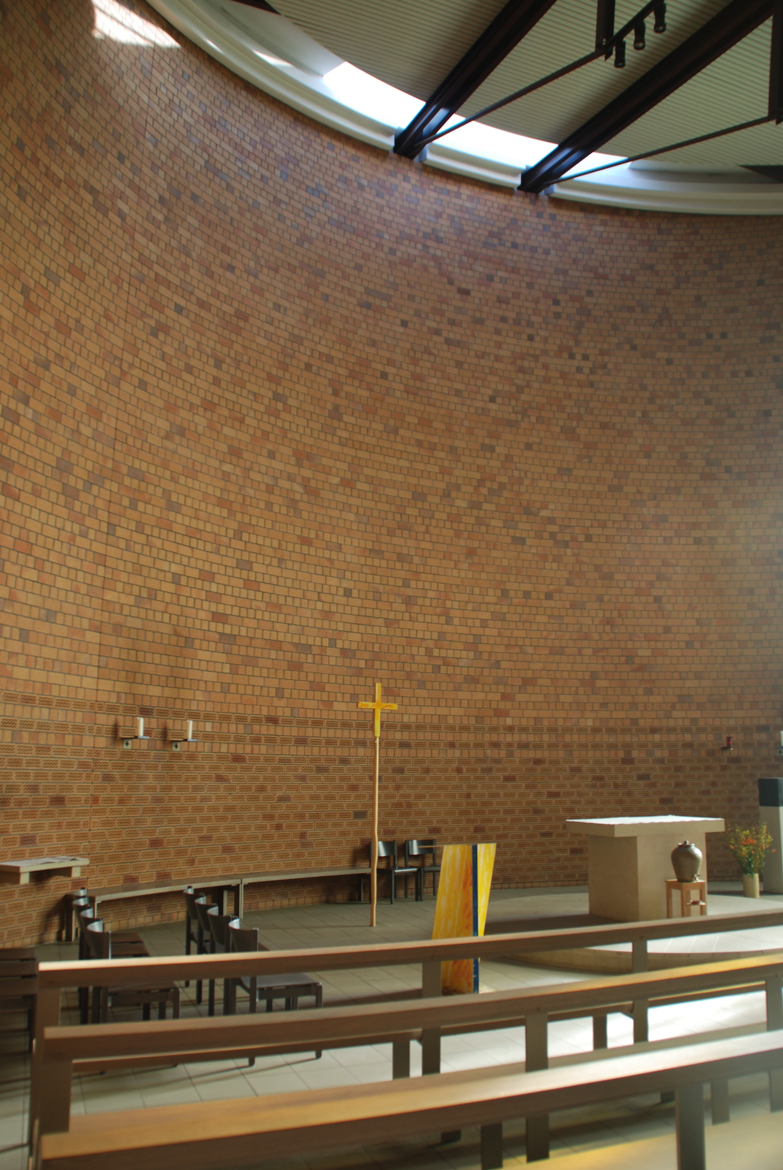 Hamburg-Neuallermöhe, kath. Edith-Stein-Kirche, Inneres, Altarbereich